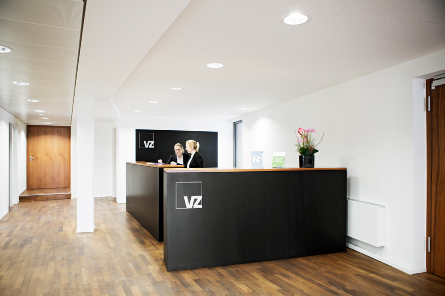 VZ VermögensZentrum Deutschland, Hauptsitz in München